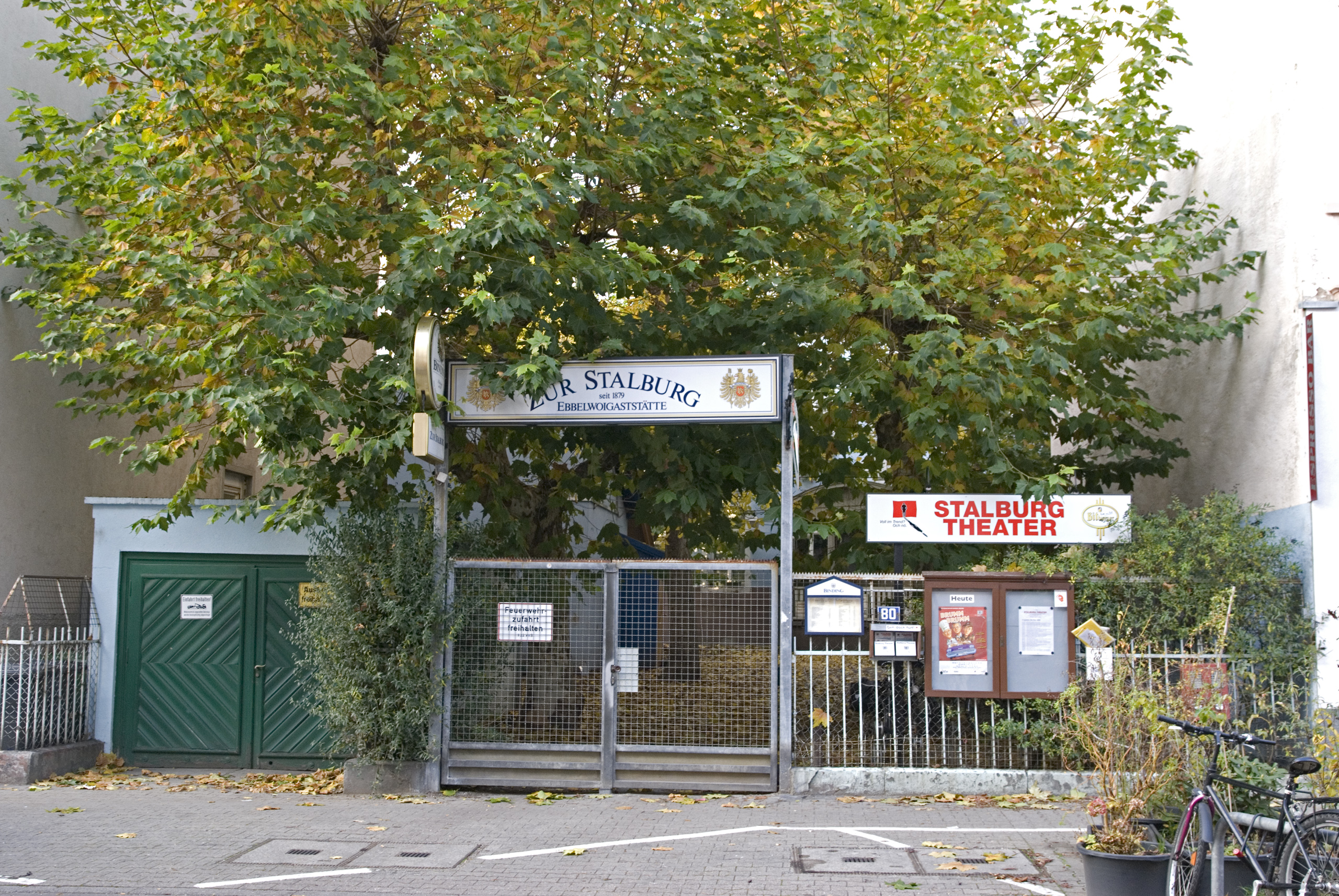 Stalburg Theater, Glauburgstraße, Frankfurt-Nordend